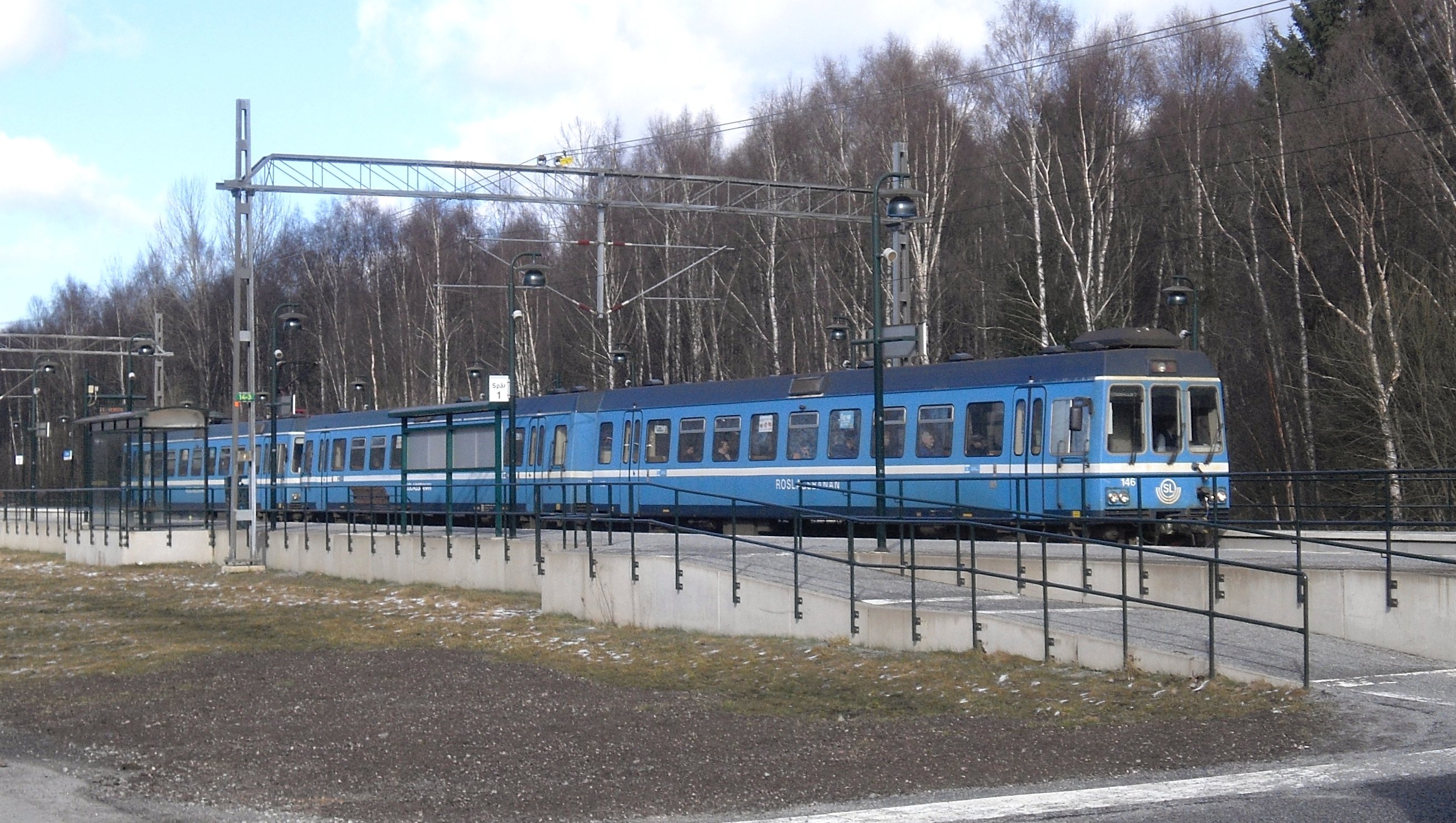 Visinge station vid Roslagsbanan i Täby